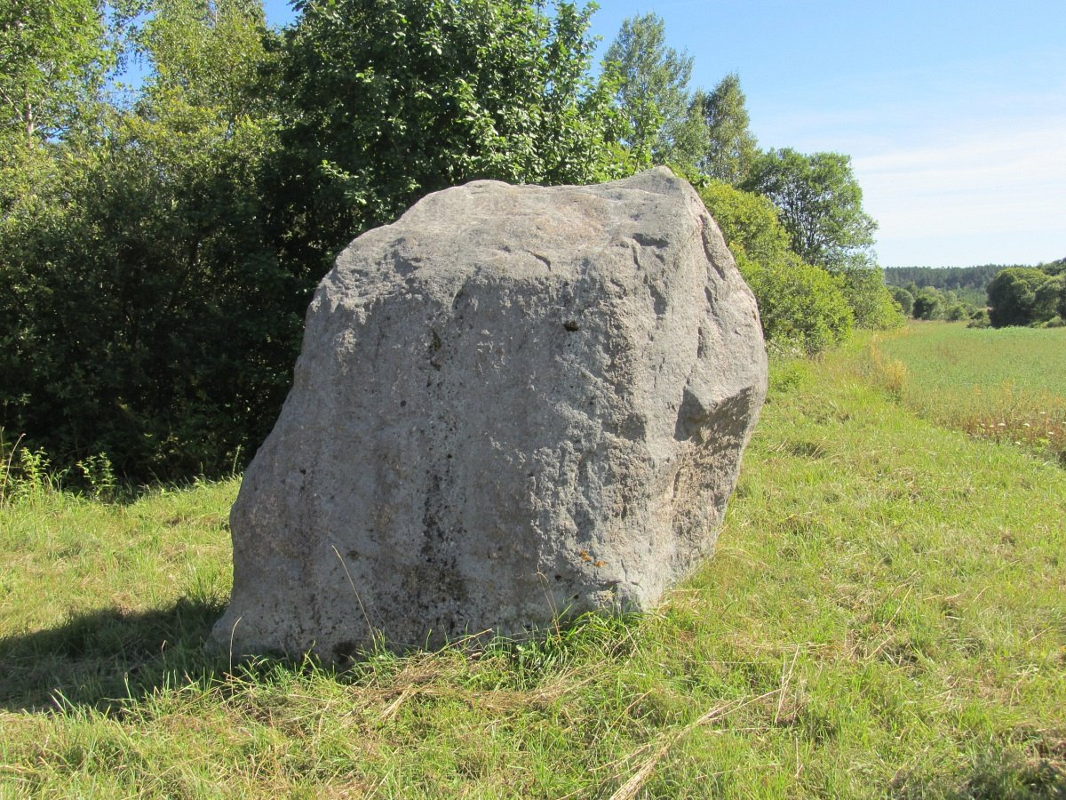 Хведзевічы. Хведзевіцкі валун